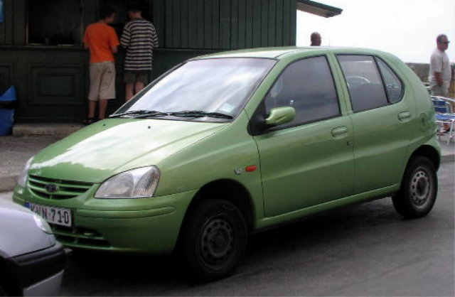 Tata Indica